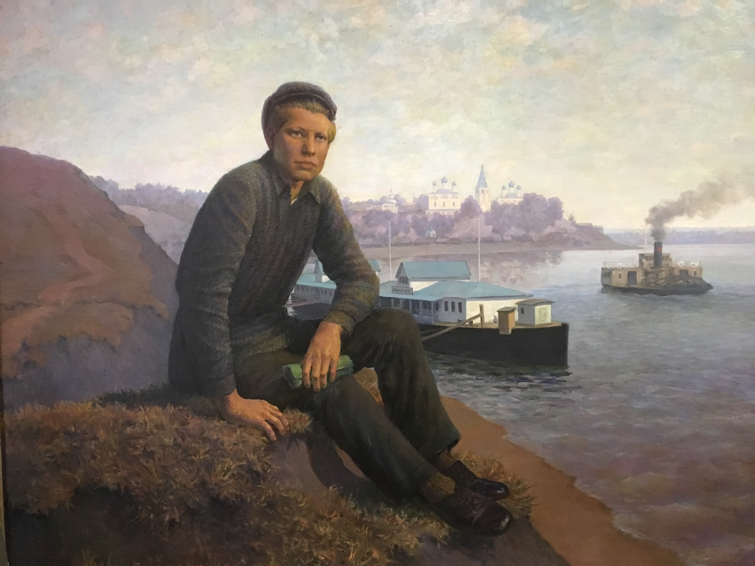 будущий маршал Советского Союза Устинов, в годы учебы в проф тех школе